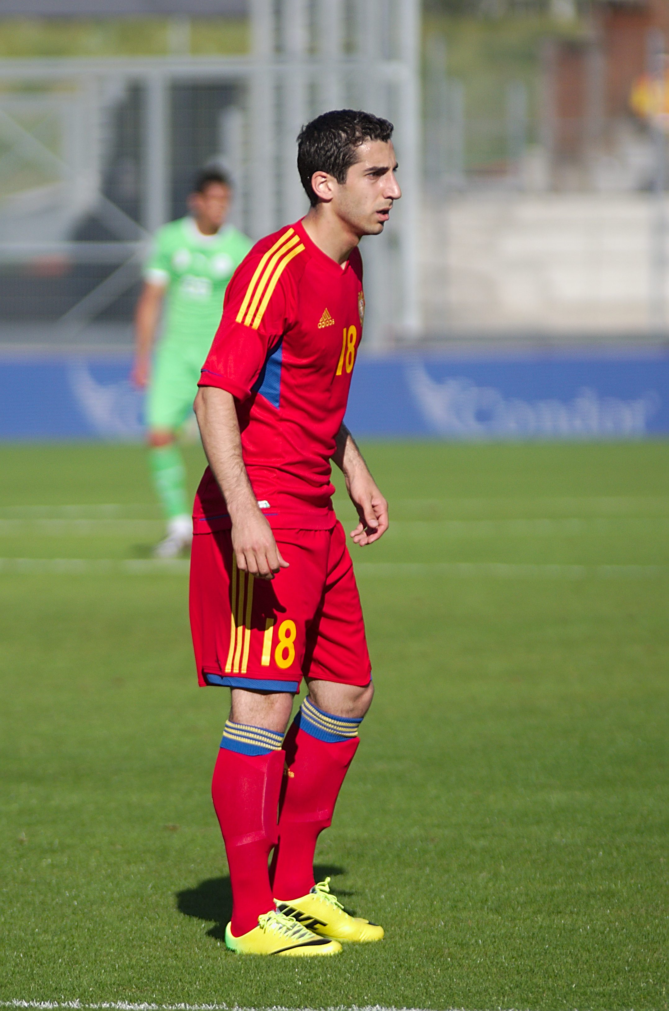 Algérie - Arménie - 20140531